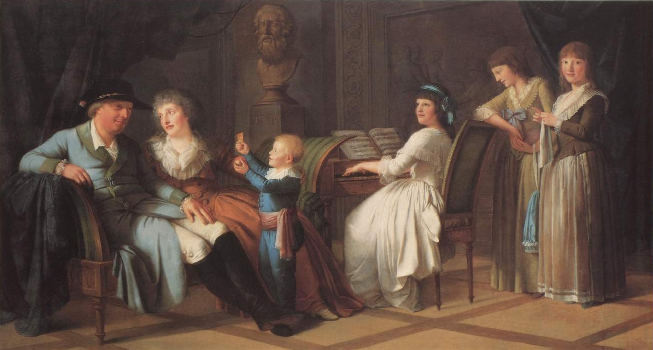 Familie des Architekten Reinhard Ferdinand Heinrich Fischer, Ölgemälde von Philipp Friedrich Hetsch, 1788, ausgestellt in Schloss Ludwigsburg. – Von links: Reinhard Ferdinand Heinrich Fischer, seine Frau Juliana Charlotte geb. Bilfinger, der Sohn Ferdinand, die drei Töchter Franziska Wilhelmine Luise, Henrike Franziska Charlotte und Charlotte Juliane Franziska.